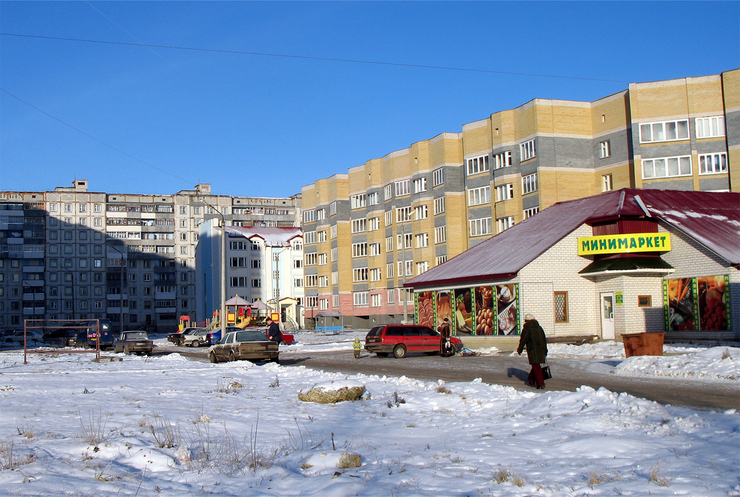 3 квартал